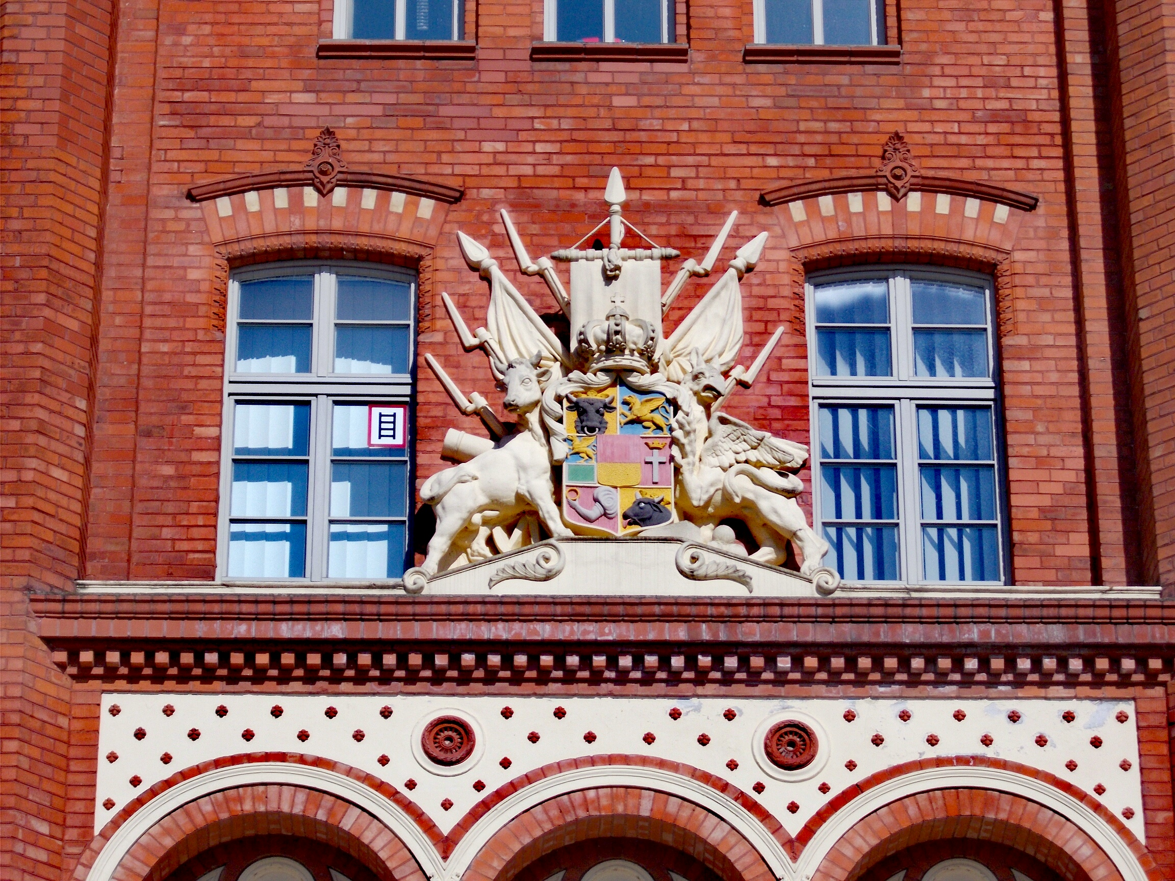 Das Großherzoglich-Mecklenburgische Wappen über den Eingang zur Artillerie-Kaserne von 1859